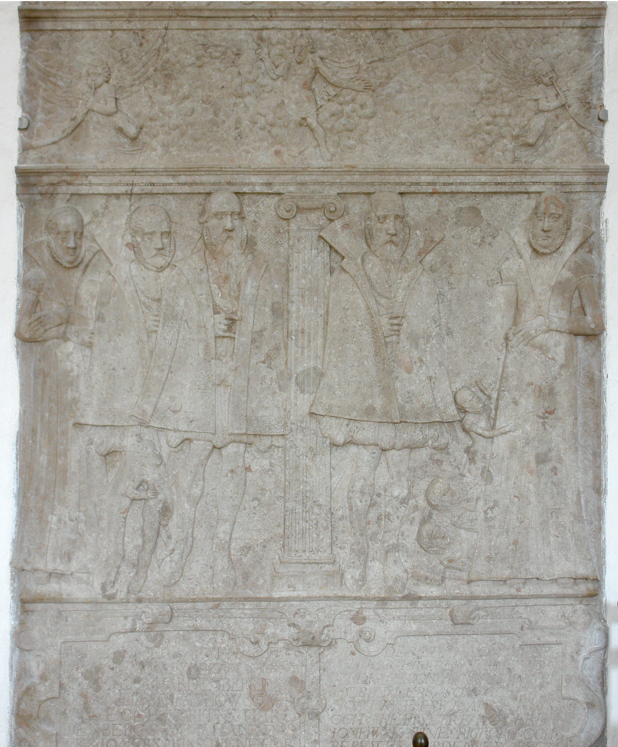 Kirche von Klovborg.